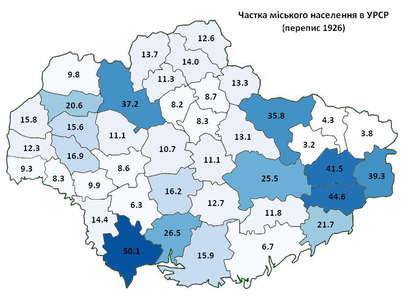 Частка міського населення в УРСР за переписом 1926 року / Urbanization rate in Ukrainian SSR, 1926 census